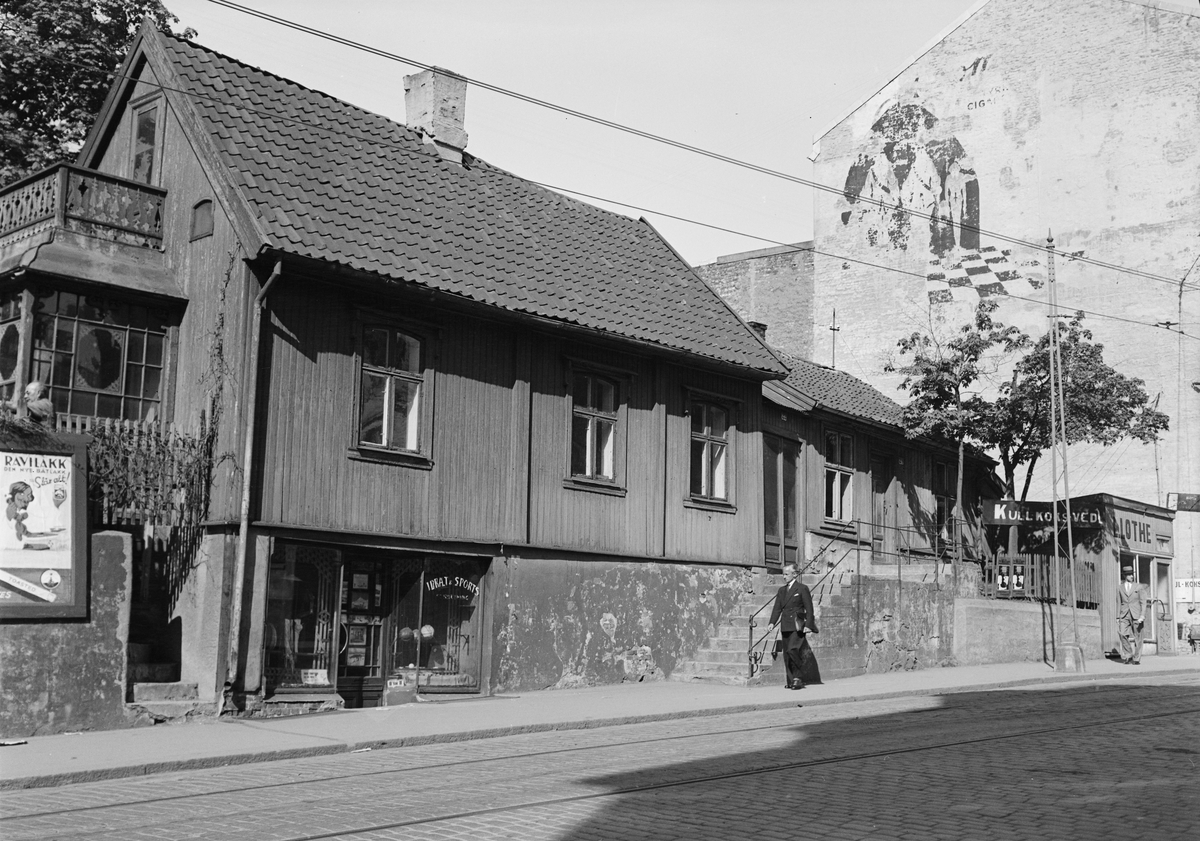 Tidligere Briskebyveien 22 og 24, siden revet. Foto: Ruth Raabe, fra Byhistorisk samling hos Oslo Museum.